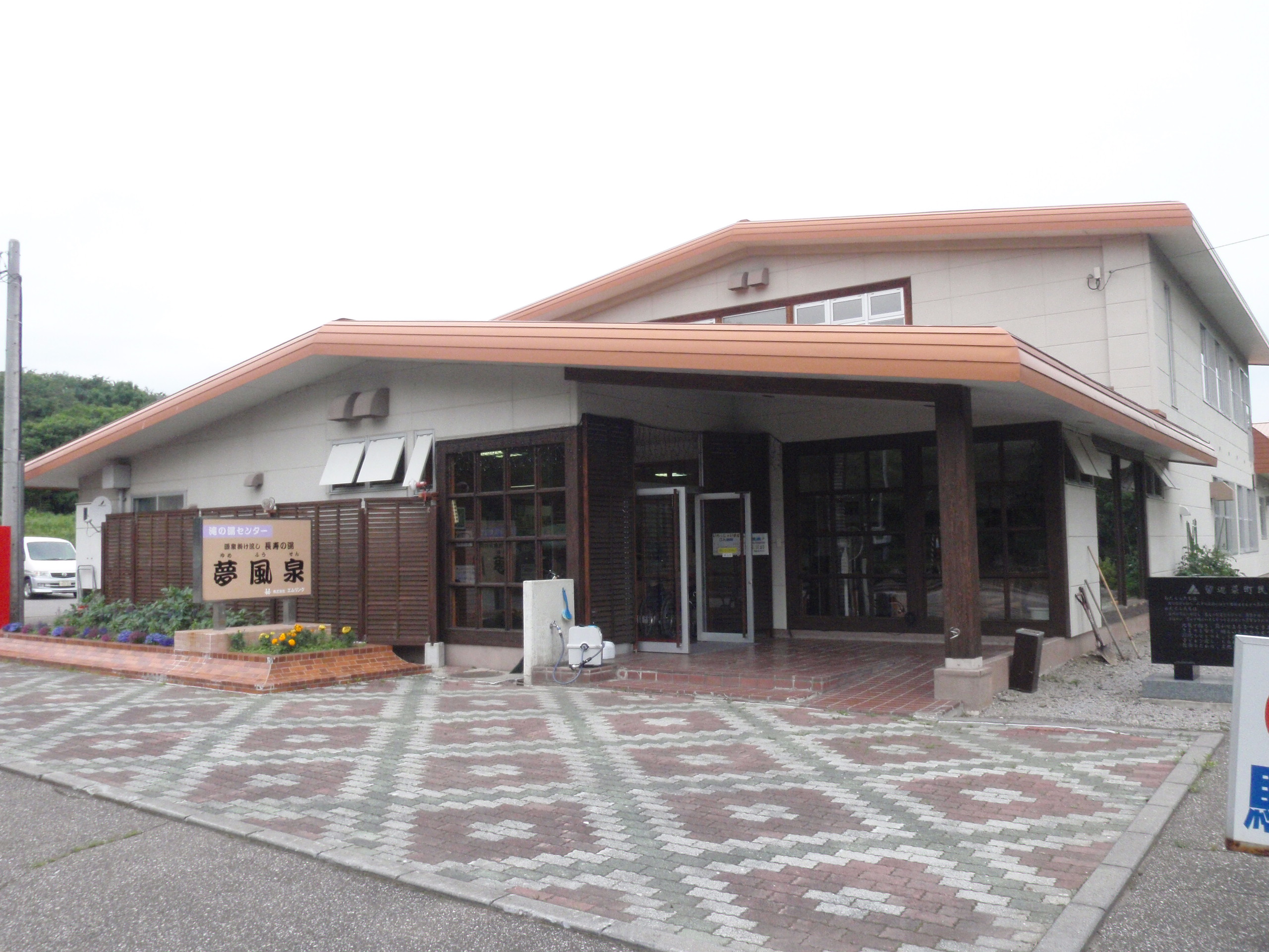 滝の湯温泉、滝の湯センター夢風船